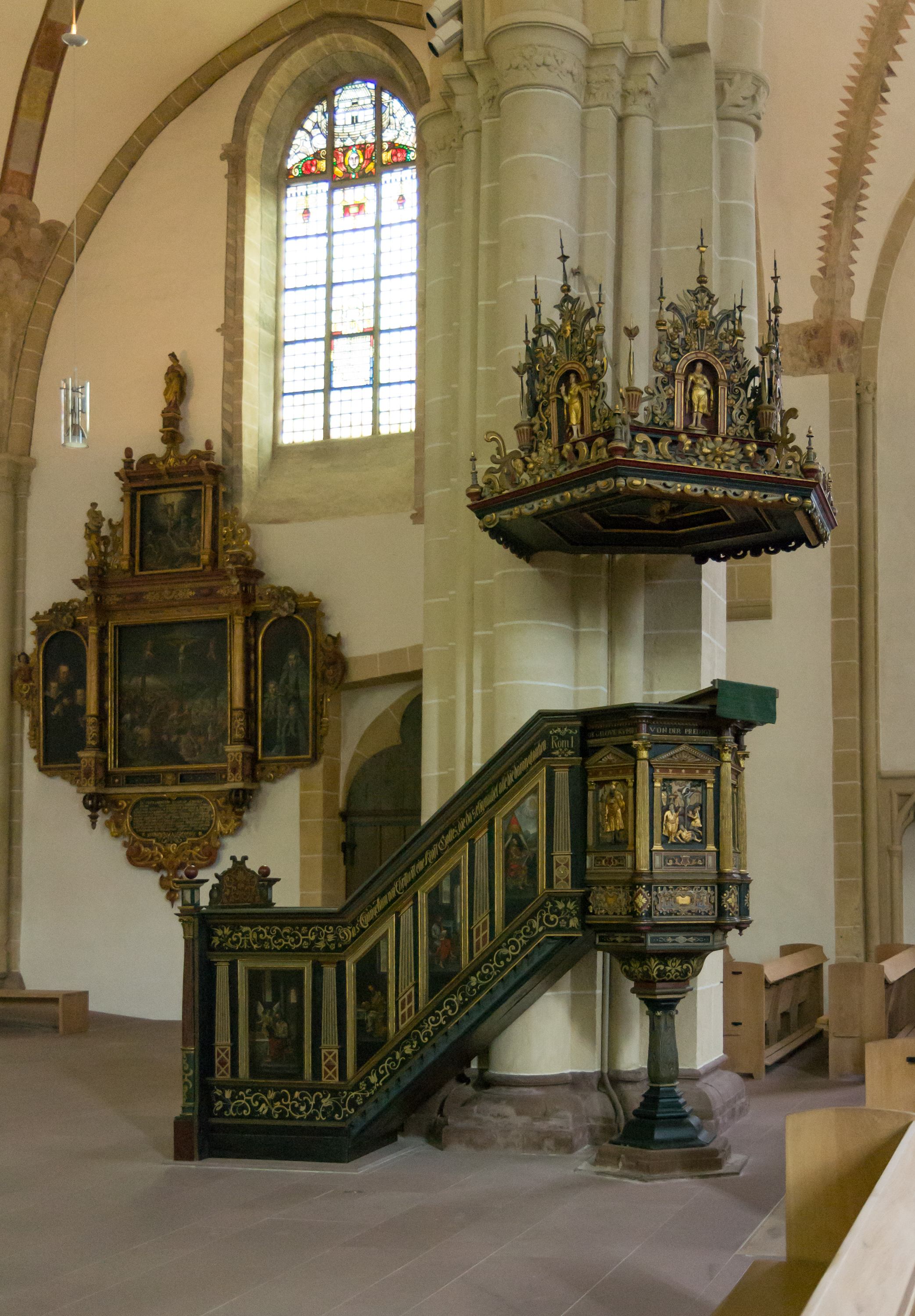 This image shows a heritage building in Germany, located in the North Rhine-Westphalian city Lemgo. Evangelisch-lutherische Kirche St. Nicolai in Lemgo; Kanzel, erbaut zwischen 1600 und 1610